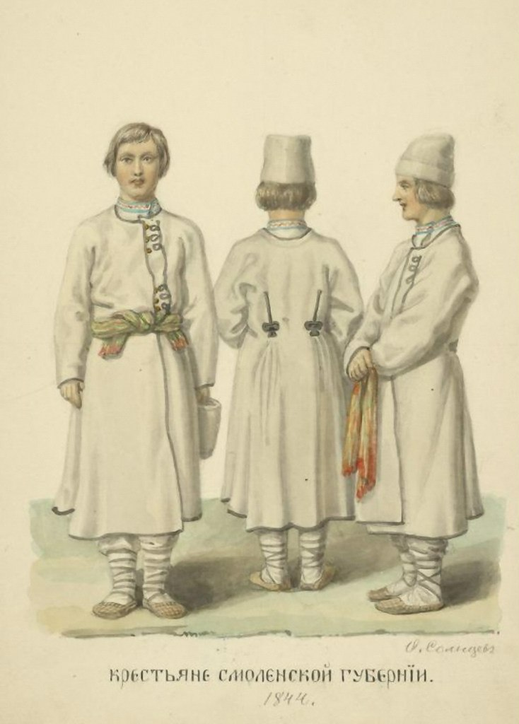 Солнцев Ф. Г. Крестьяне Смоленской губернии, 1844 год. «Одежды Русского государства».